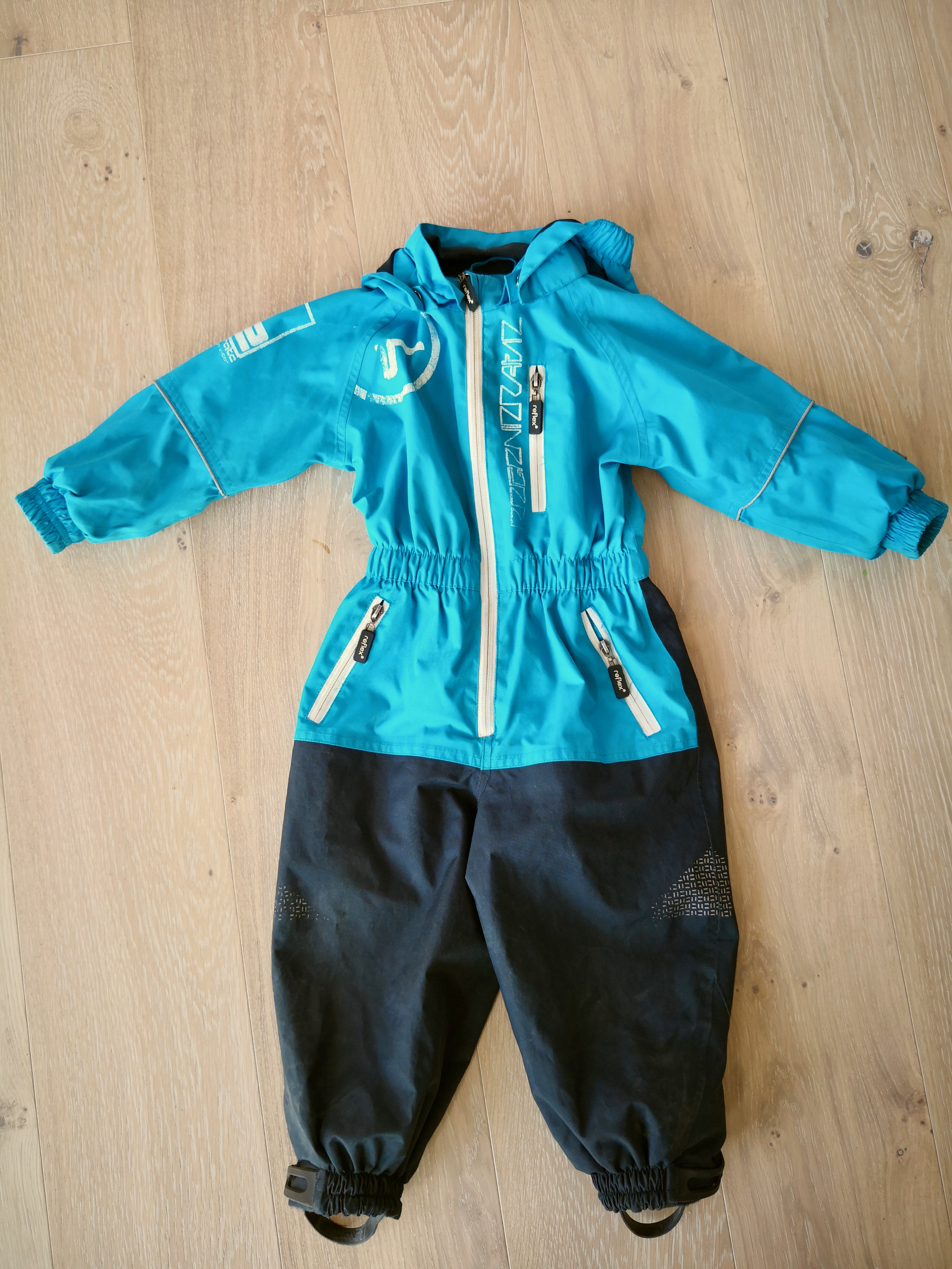 Parkdress størrelse 86 (ca. 1,5 - 2 år)